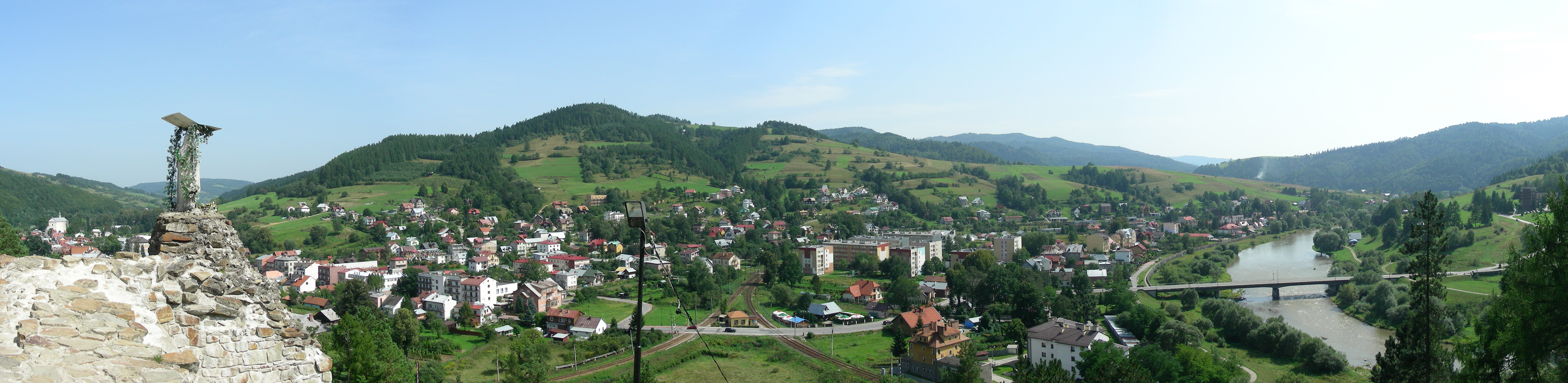 panorama Muszyny z góry Baszty